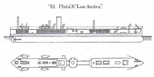 Dibujo del Barco.